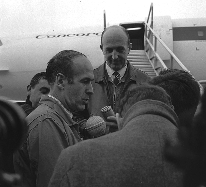 Aéroport de Toulouse-Blagnac. 29 Novembre 1969. Vue de Monsieur Giscard d'Estaing et d'André Turcat face à la presse en bas du Concorde.